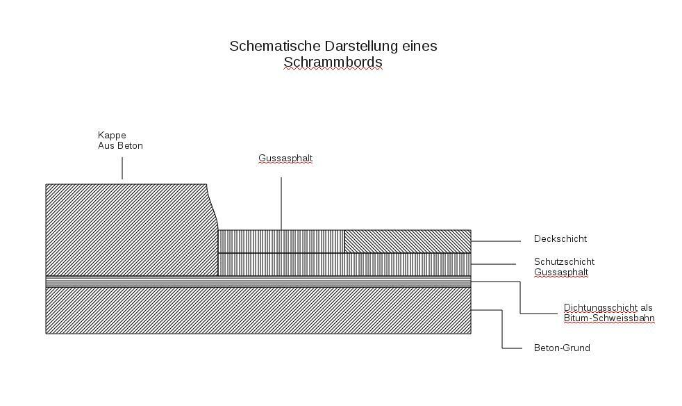 Schematische Darstellung eines Schrammbords.